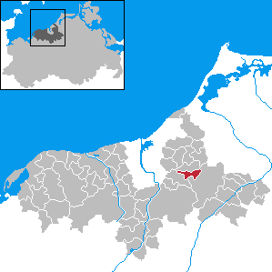 Thulendorf in Mecklenburg-Western Pomerania - District Bad Doberan